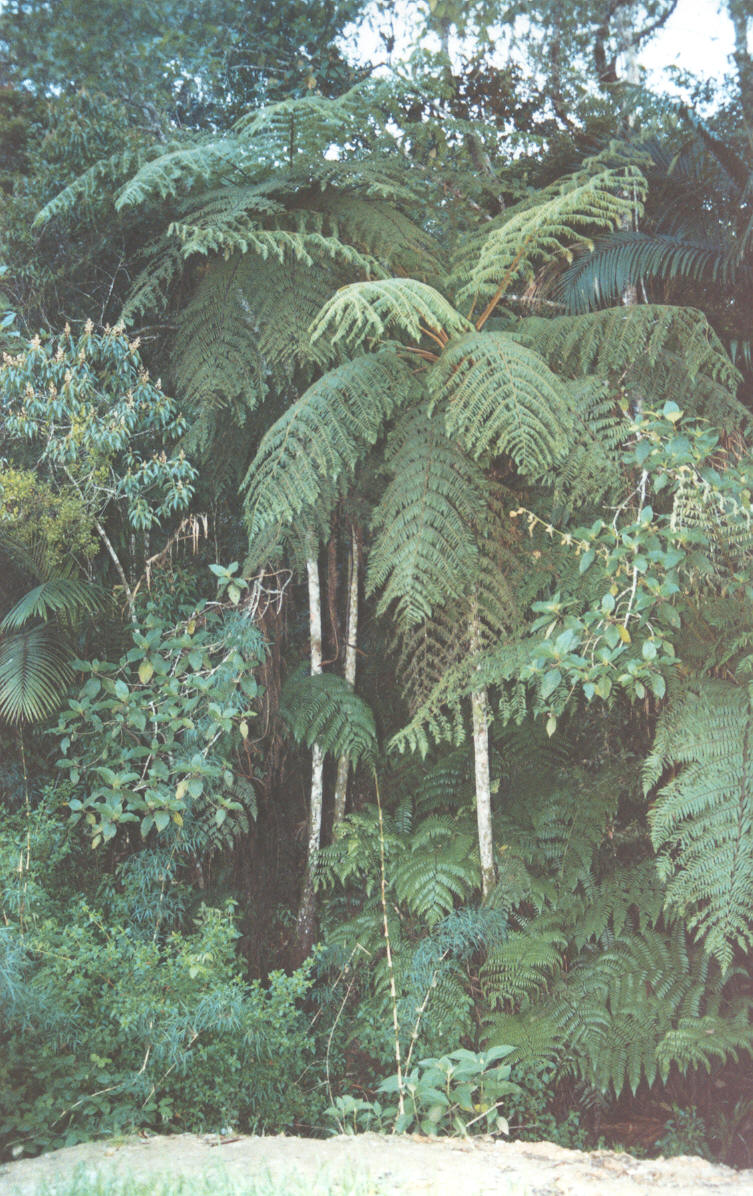 Ejemplares de helechos arborescentes en un área de selva nublada, a unos 2000 m. de altitud próxima a la entrada de la Colonia Tovar (Estado Aragua, Venezuela). Autor: Fev. Agosto 2006. Imagen con luz artificial tomada a las 5 de la tarde.